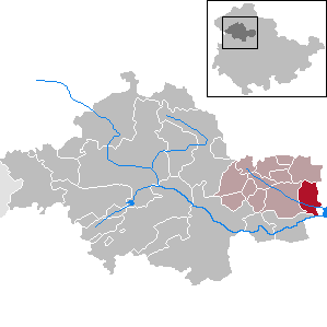 Ballhausen in Thuringia - Unstrut-Hainich-Kreis